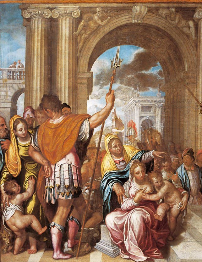 Presentación en el Templo, Museo de Castelvecchio